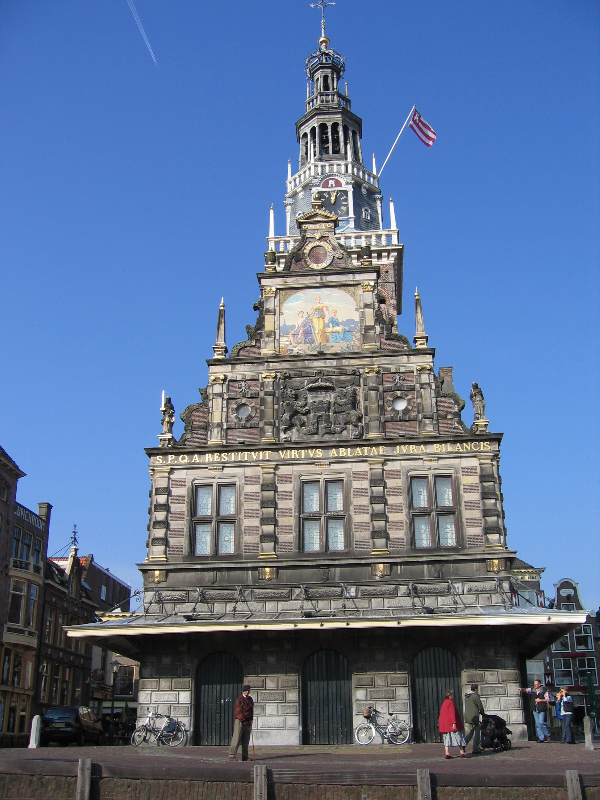 Alkmaar, waag, feb. 2006